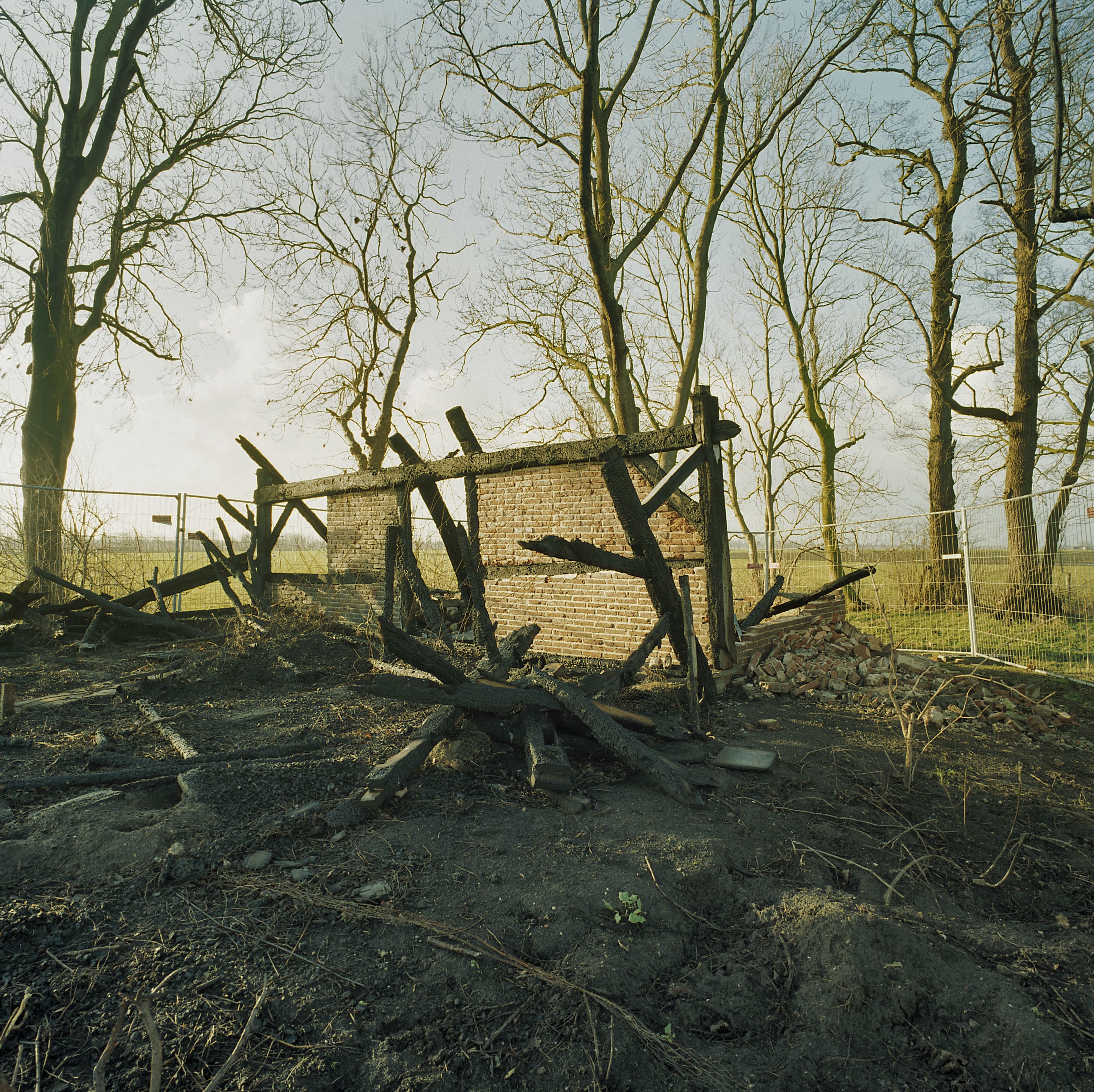 Boerderij "Wilms Boo" van G.Wilms: Overblijfselen na de brand